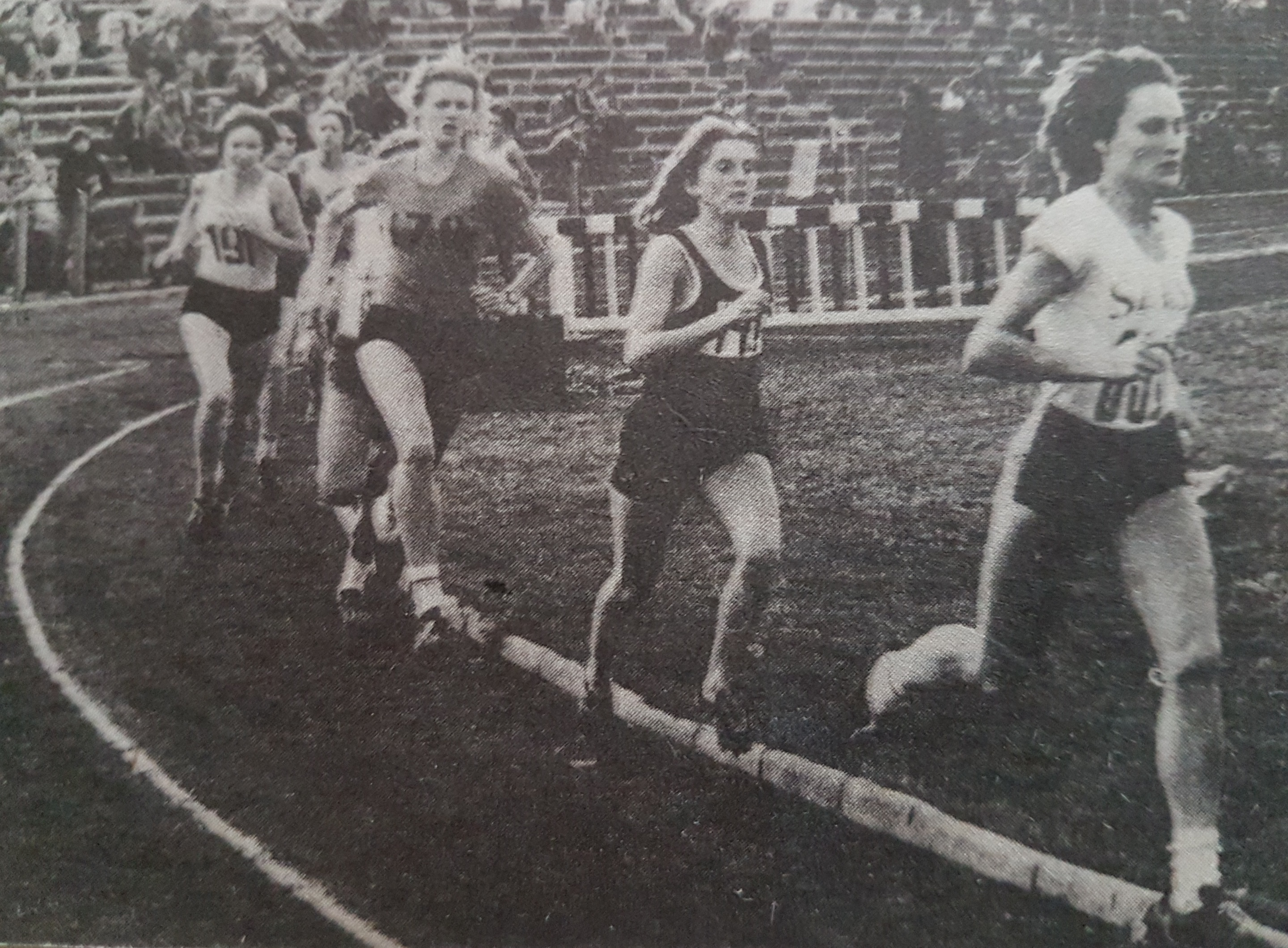 Stadion LKS Pomorza Stargard